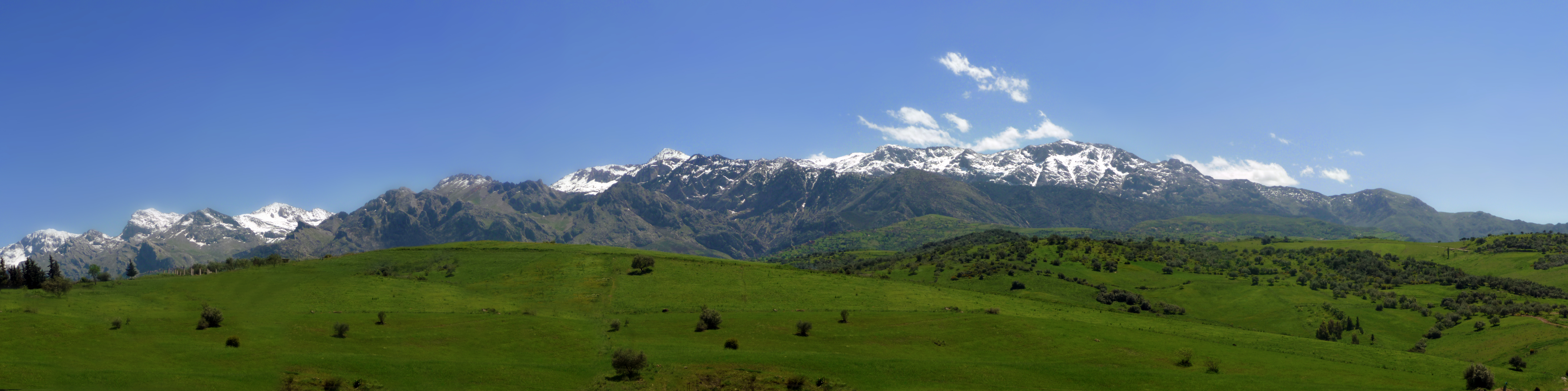 Montagne de DJURDJURA vue de Mechtras TiziOuzou en printemps,Panorama